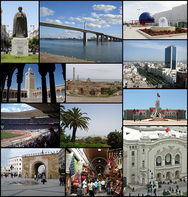 Montage de diverses photos de Tunis (Tunisie) incluant les éléments suivants : Statue d'Ibn Khaldoun sur l'avenue Habib Bourguiba Pont Radès-La Goulette Planétarium de la Cité des sciences Minaret de la mosquée Zitouna Ruines de Carthage Avenue Habib Bourguiba Stade olympique de Radès Parc du Belvédère Siège de la municipalité Porte de France Allée d'un souk de la médina Théâtre municipal